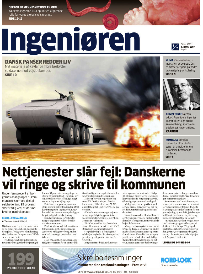 Ingeniørens forside 9. januar 2009